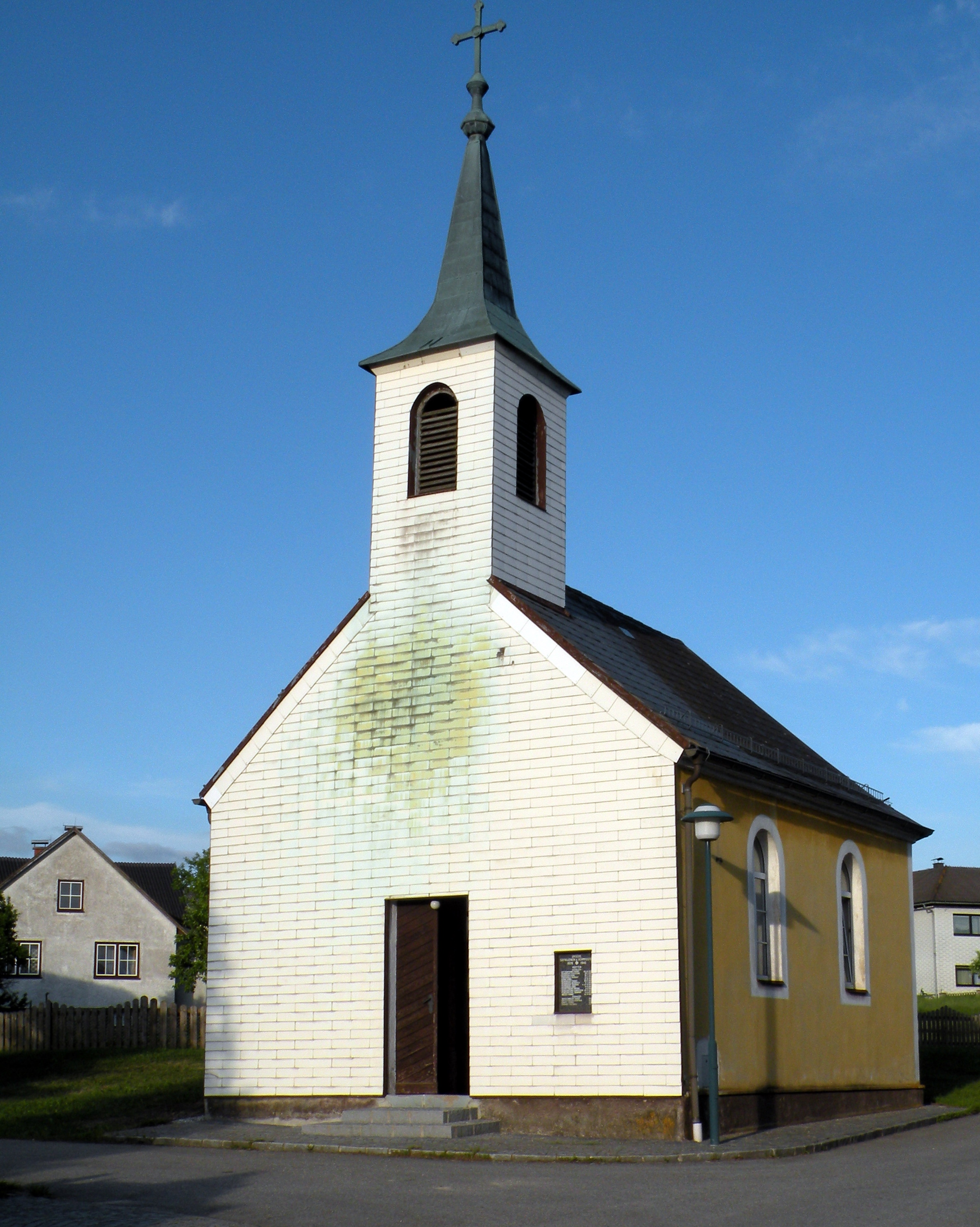 Kapelle in Motten in der Stadt Heidenreichstein